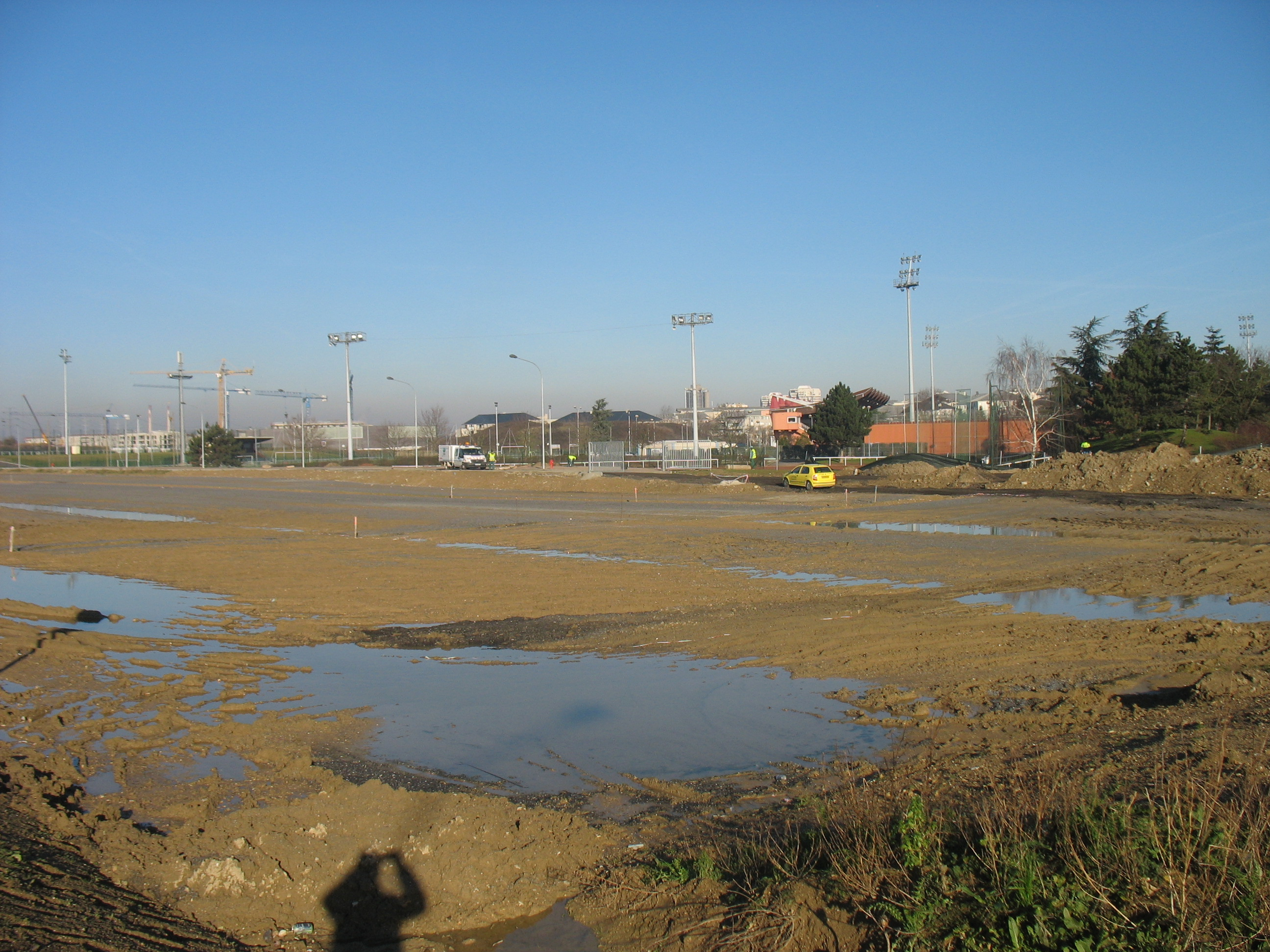 Le site du futur atelier de maintenance dans le cadre du prolongement de la ligne 8 du métro. Au fond à droite, le stade Duvauchelle de Créteil